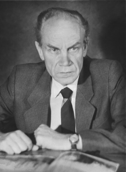 Рихард Йоонас